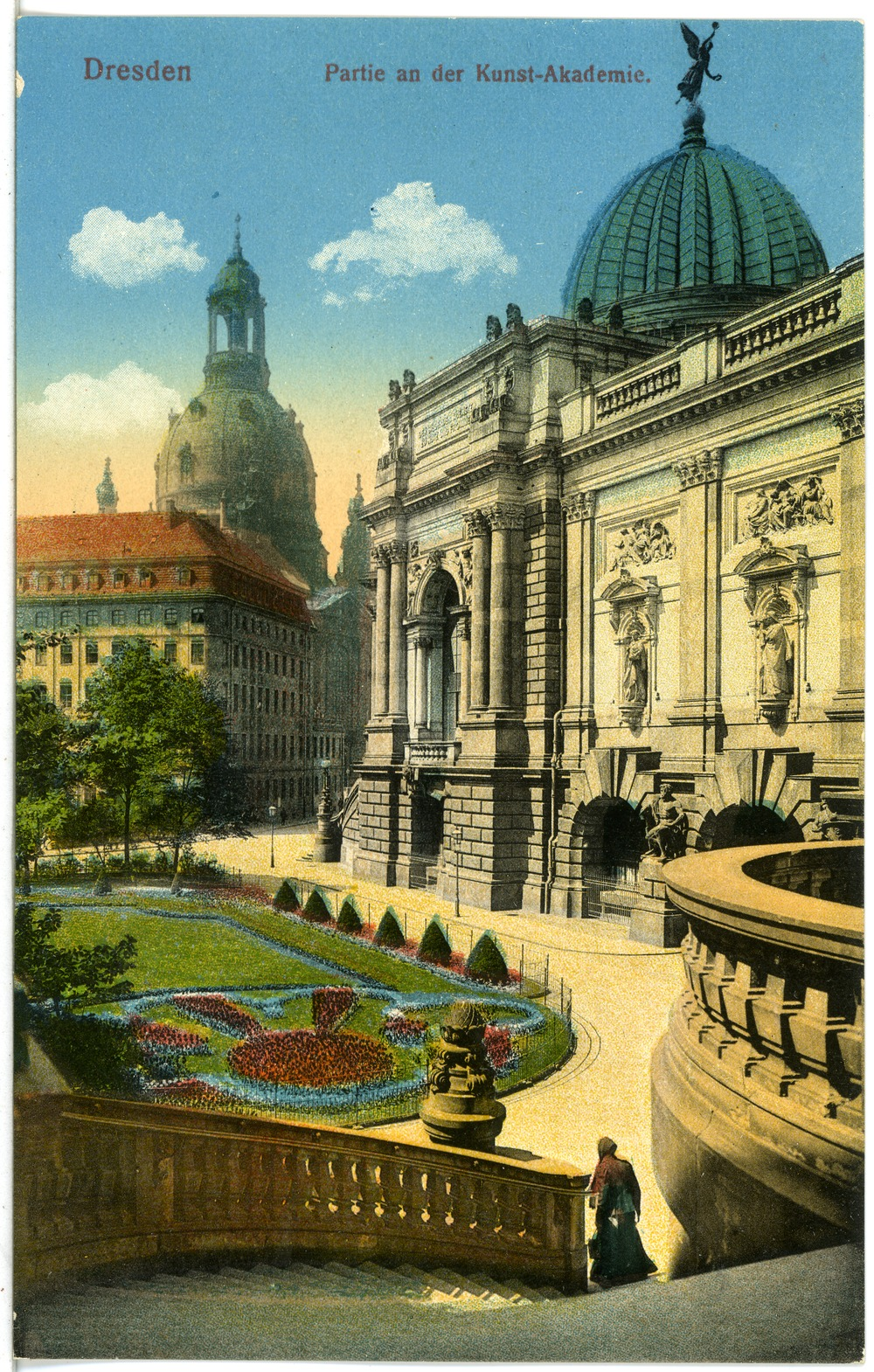 Dresden; An der Kunstakademie, Kuppel der Frauenkirche This postcard is from publisher Brück & Sohn in Meißen ( postcard has a unique number 19318 and is available in a higher resolution at the publisher. This images was uploaded in a cooperation project between Wikipedians and the publisher.